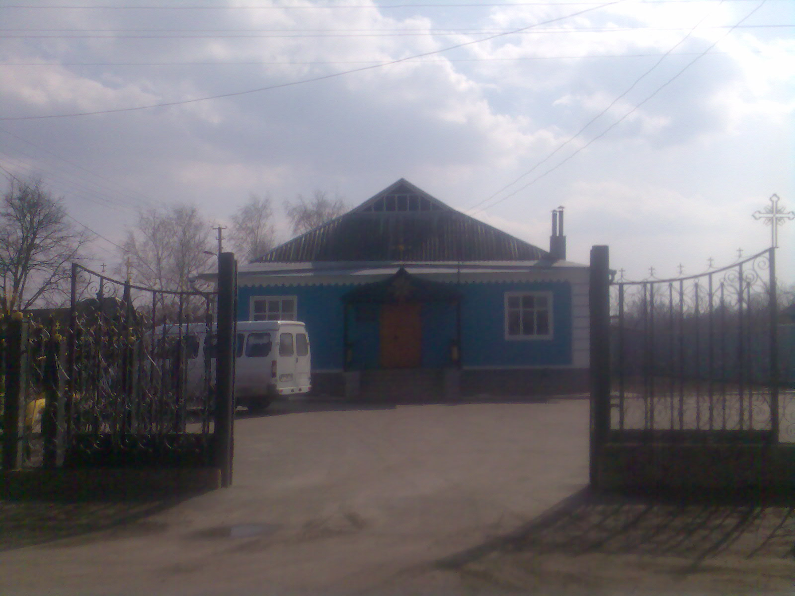 Недільна школа при вознесенському храмі (Золочів): Недільна школа при вознесенському храмі (Золочів)